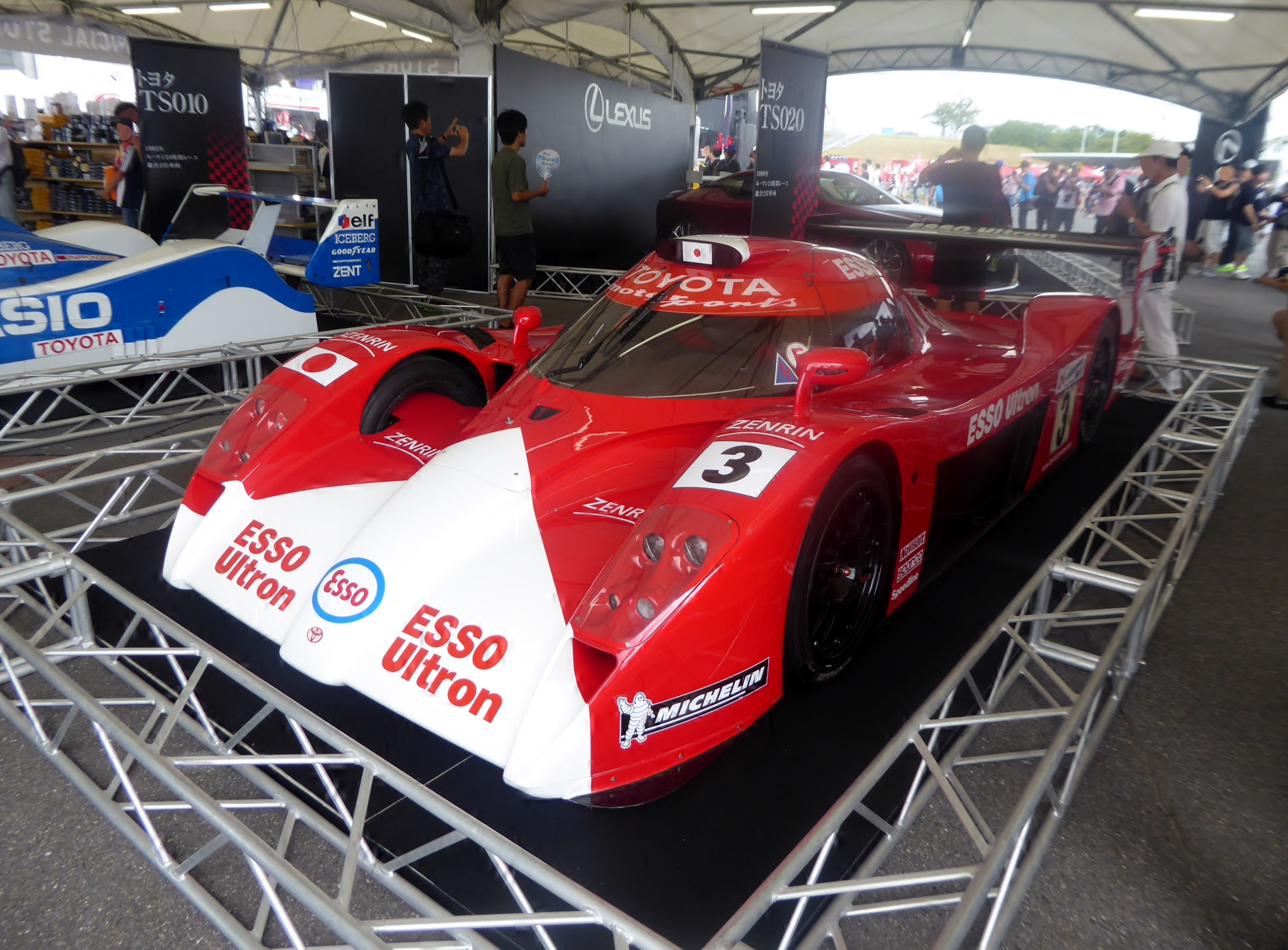 トヨタ・TS020の3号車をフロントから撮影。